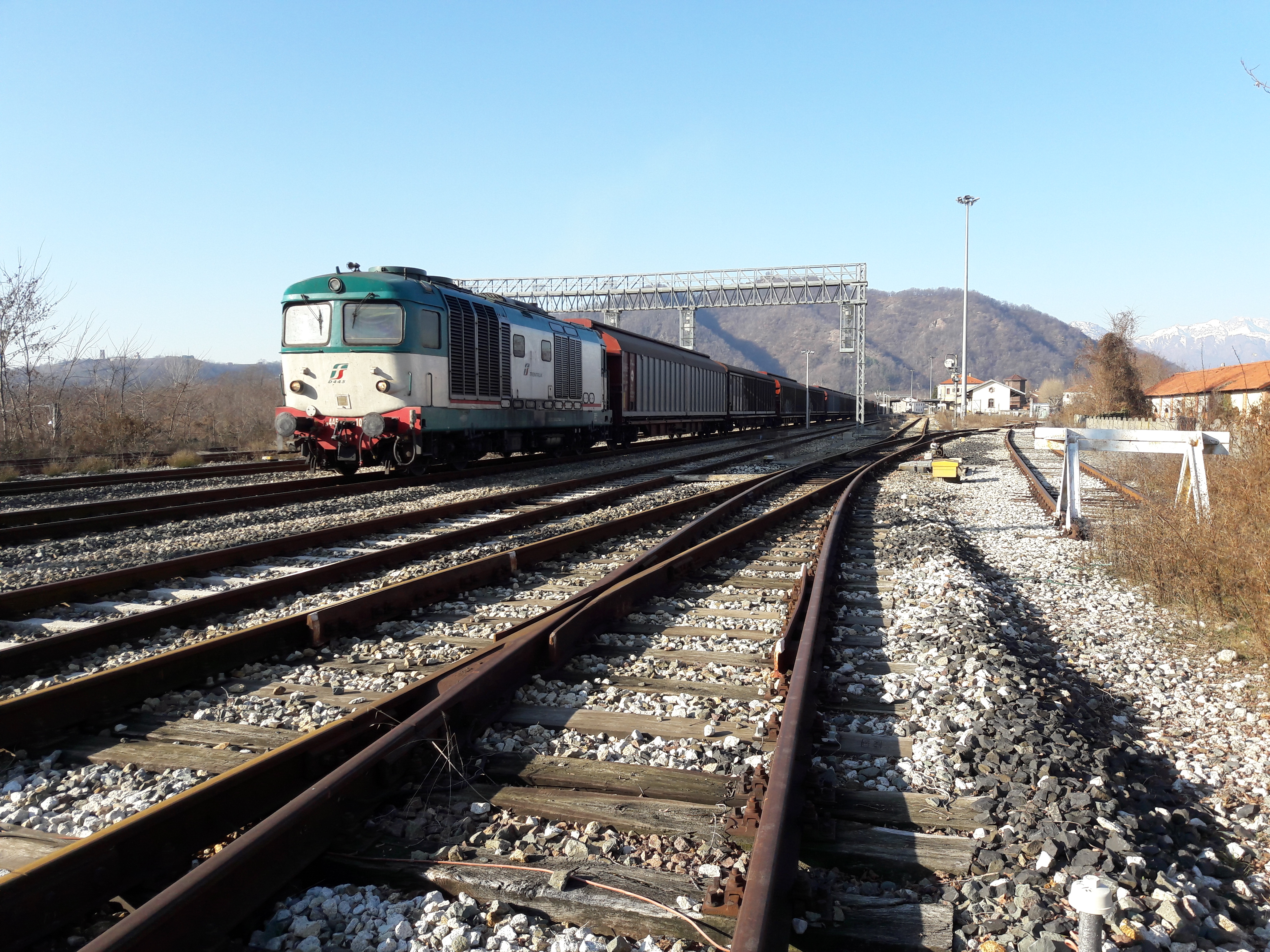 Treno merci della Kimberly-Clark in partenza dalla stazione di Romagnano Sesia. In testa il locomotore D445.